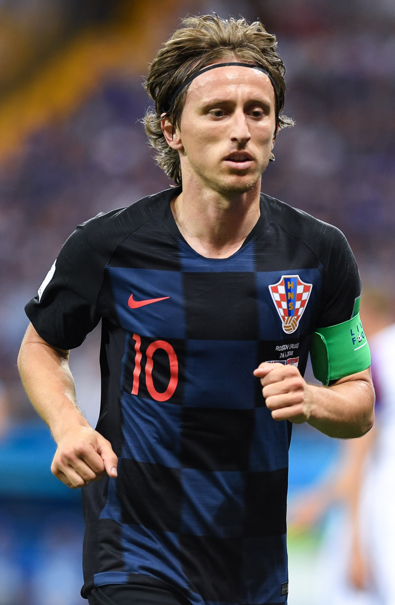 Сборная Исландии уступает Хорватии и покидает ЧМ-2018